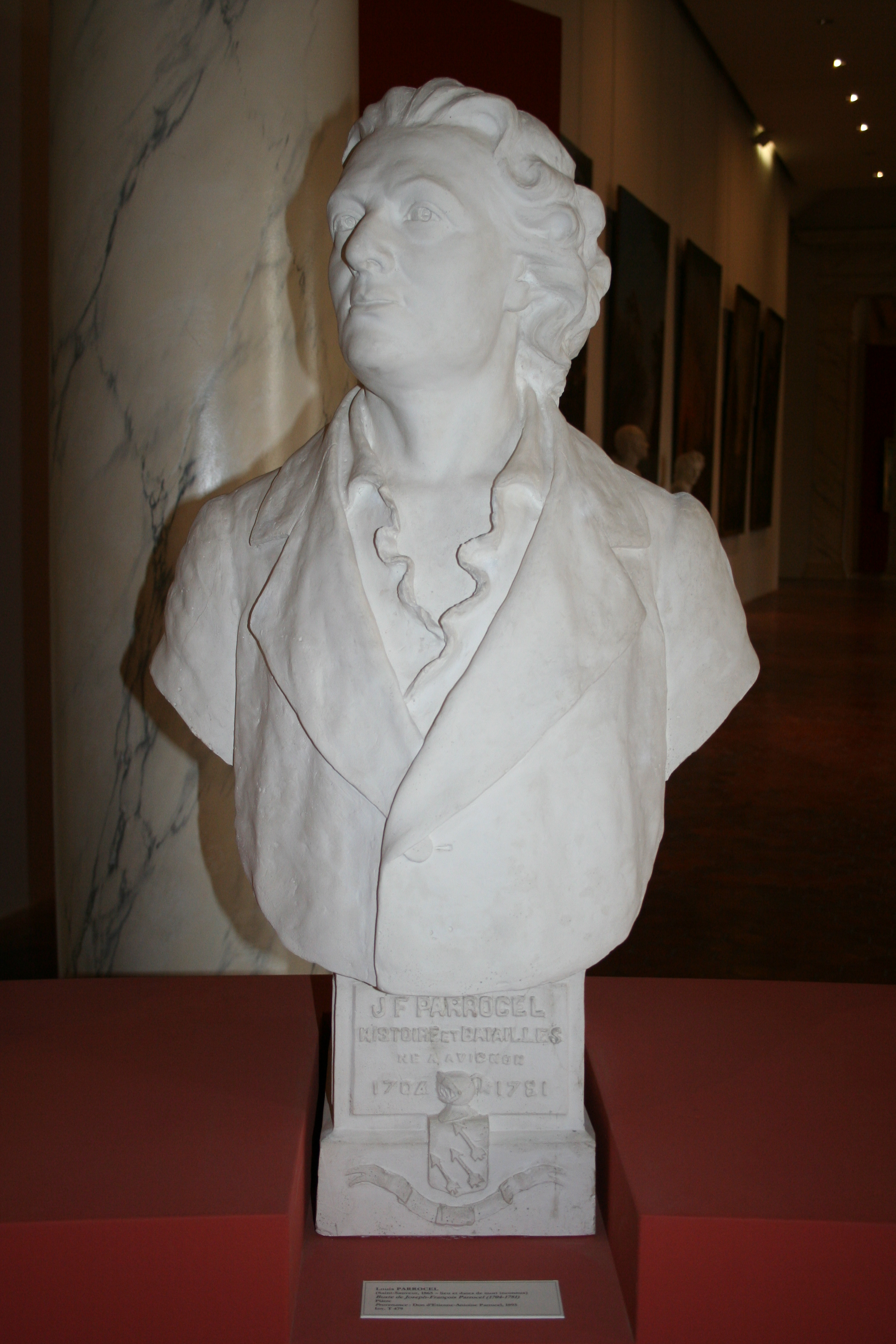 Buste de Joseph François Parrocel (1704-1781) au musée Calvet d'Avignon. Sculpture de François Parrocel(1865-?).